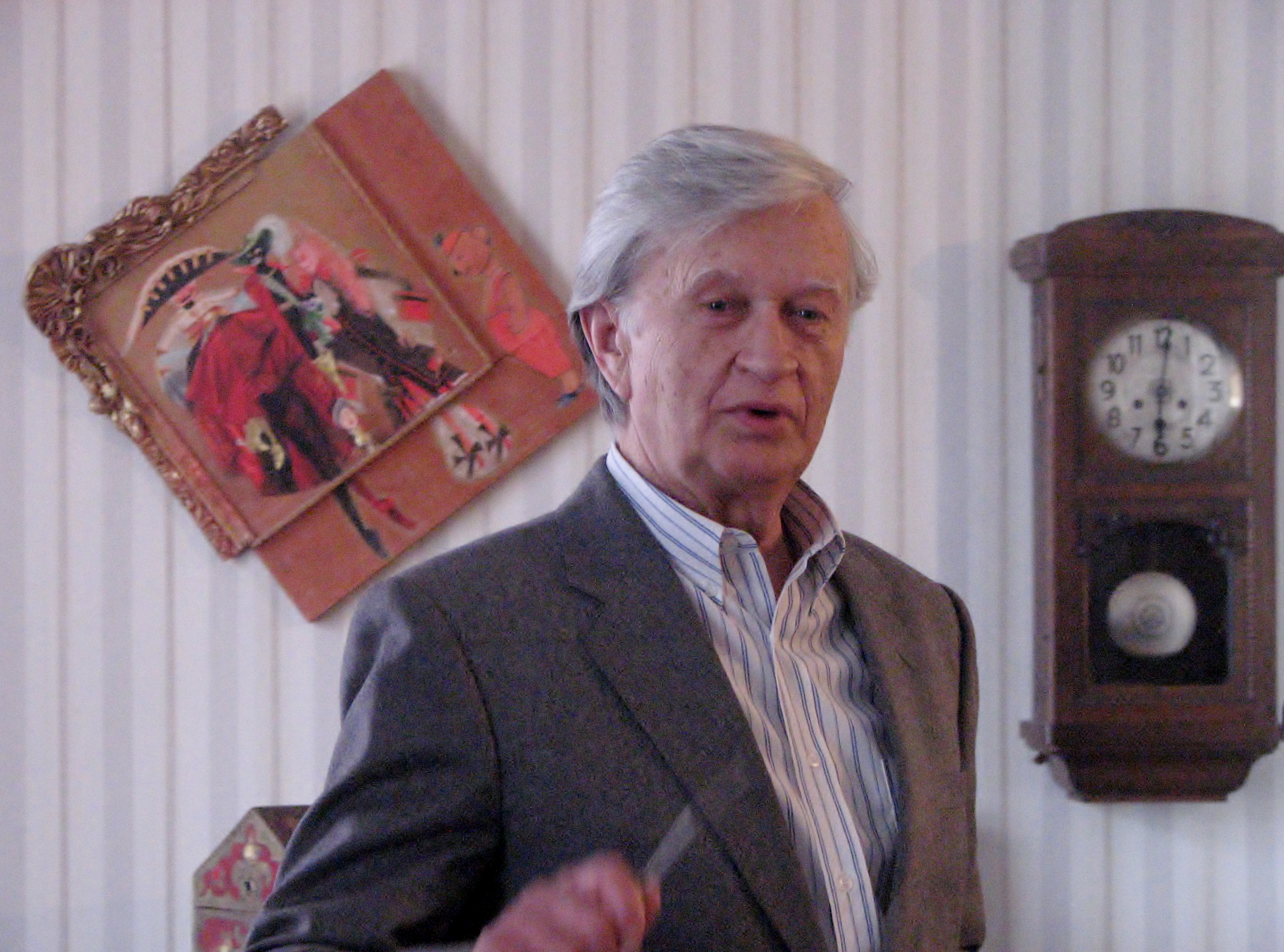 Hans Kaldoja Rahvusringhäälingu raadioteatri näitlejaauhinna vastuvõtmisel Andres Särevi teatritoas